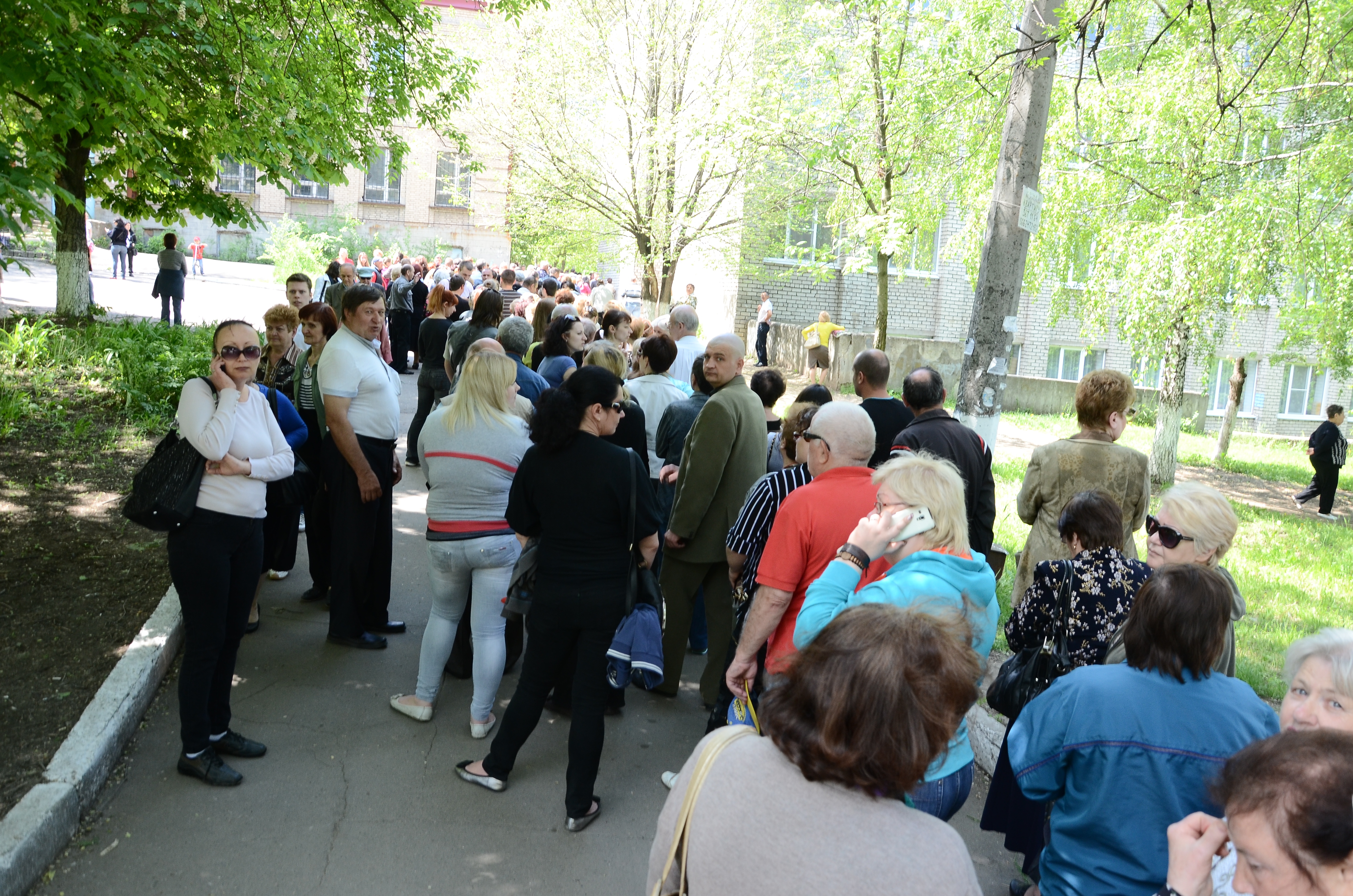 Референдум в Донецке